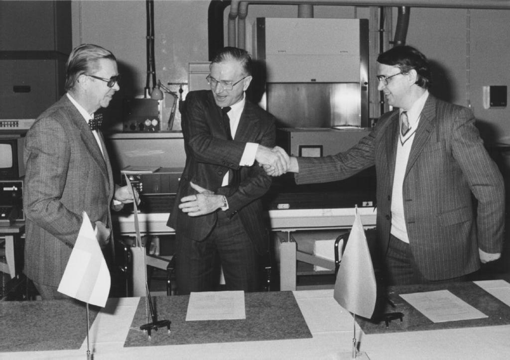 Valokuva TKK:n, VTT:n ja Neuvostoliiton Tiedeakatemian Spektroskopian Instituutin välisestä projektisopimuksen allekirjoitustilaisuudesta 1983. Kuvassa rehtori Paul A. Wuori (vas.), VTT:n pääjohtaja Pekka Jauho ja professori Vladilen Stepanovitš Letohov.